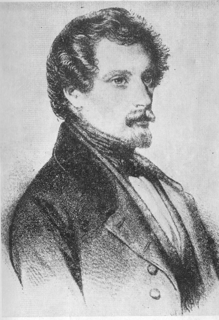 Portret Józefa Bohdana Dziekońskiego (1816—1855).